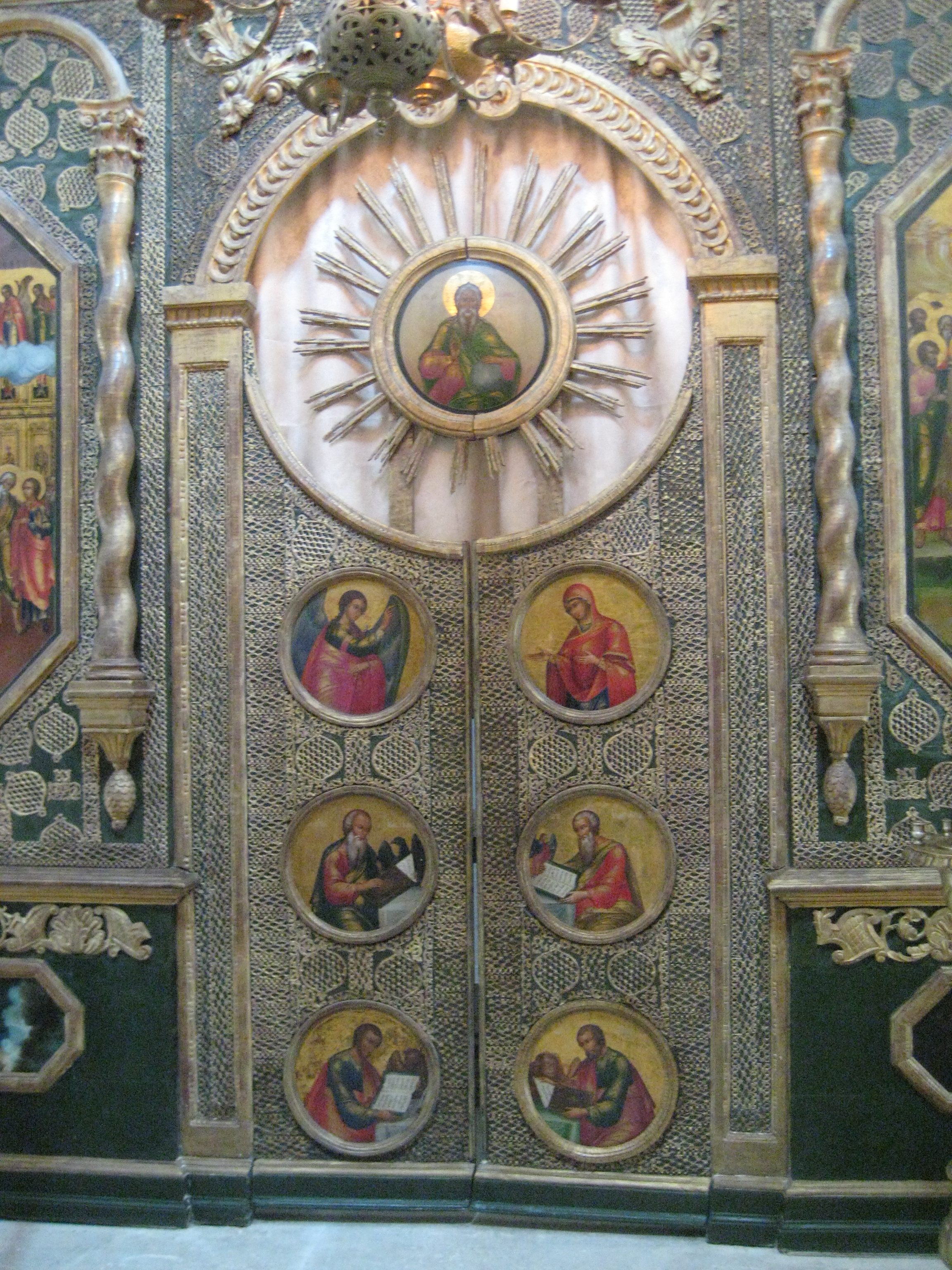 Собор Василия Блаженного